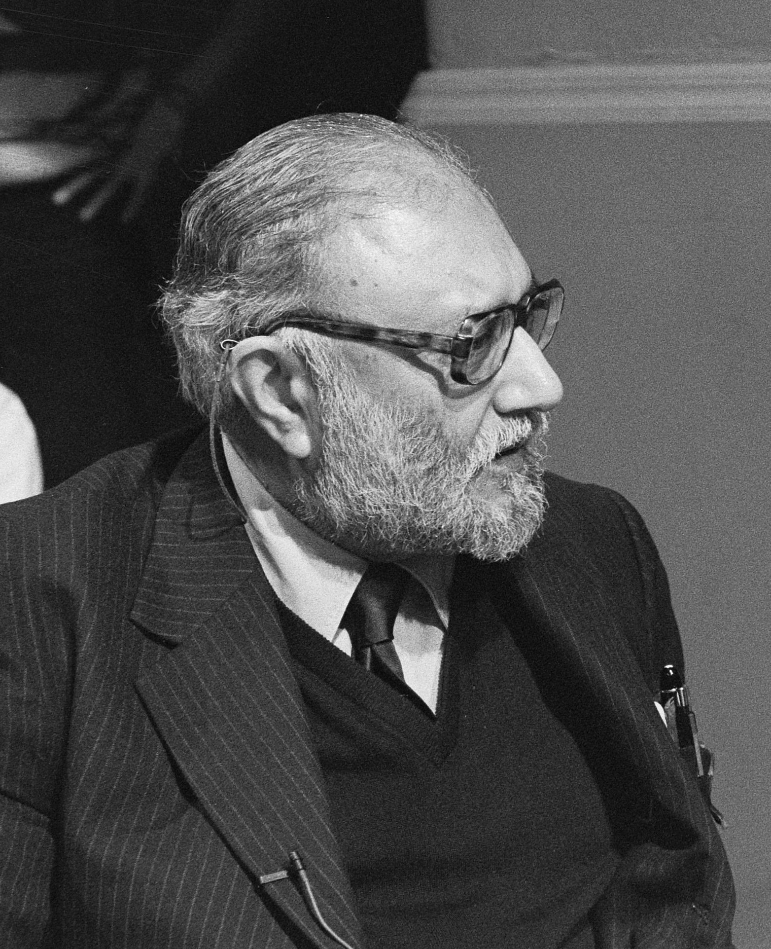 Kinderen praten met Nobelprijswinnaars in Amsterdam; Abdus Salam